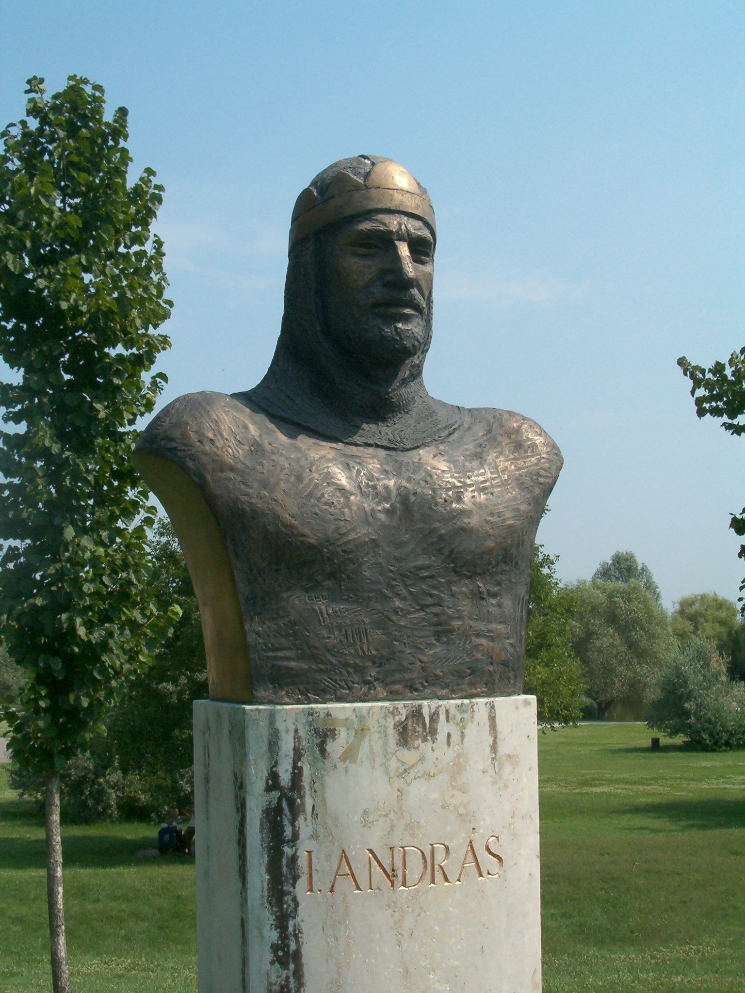 I. András király Nemzeti Történeti Emlékpark / National Historical Memorial Park in Ópusztaszer, Hungary (Diénes Attila alkotása) self shot photo (2005), Váradi Zsolt